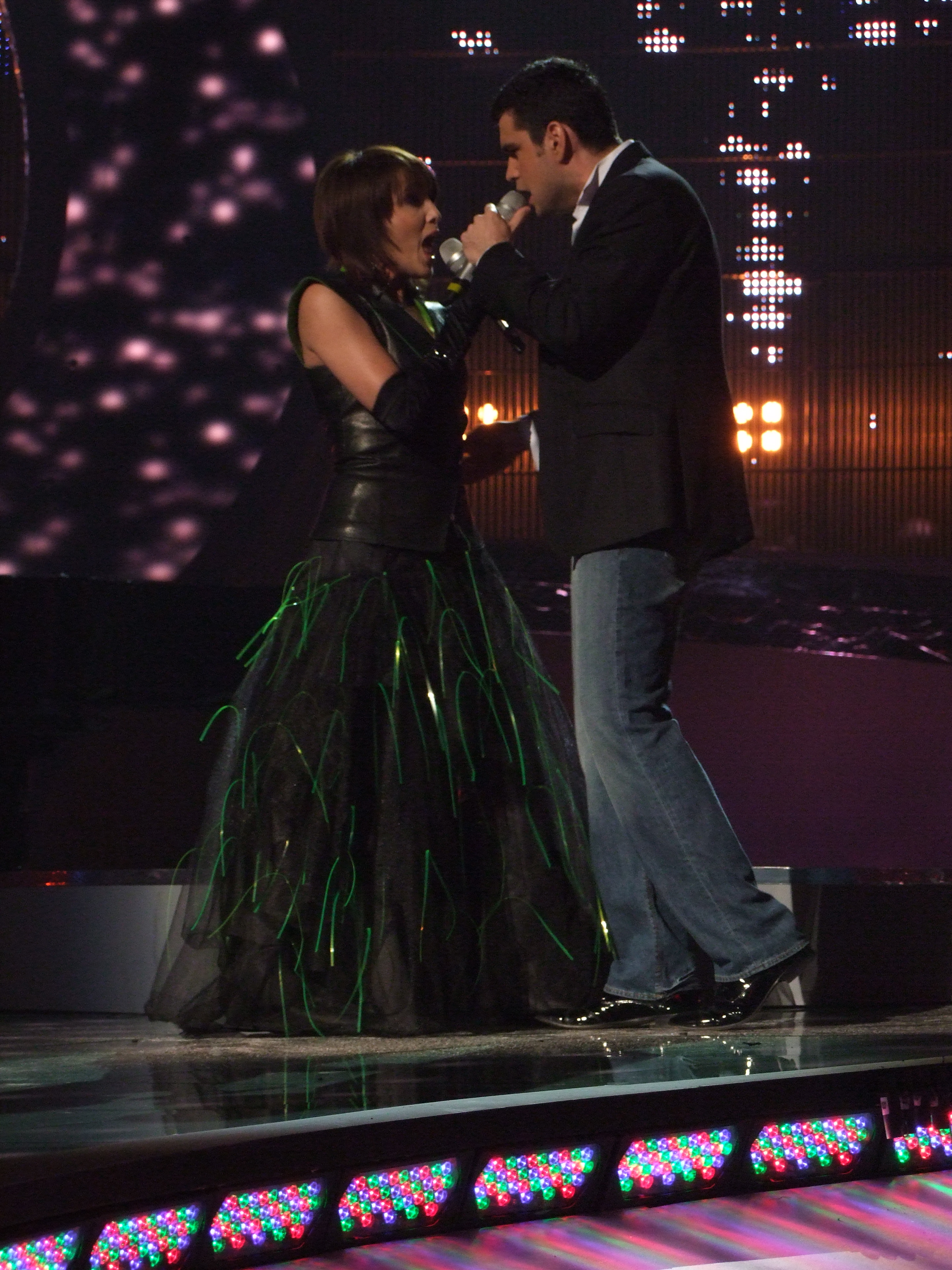 Semifinal 1 EUROVISION 2008